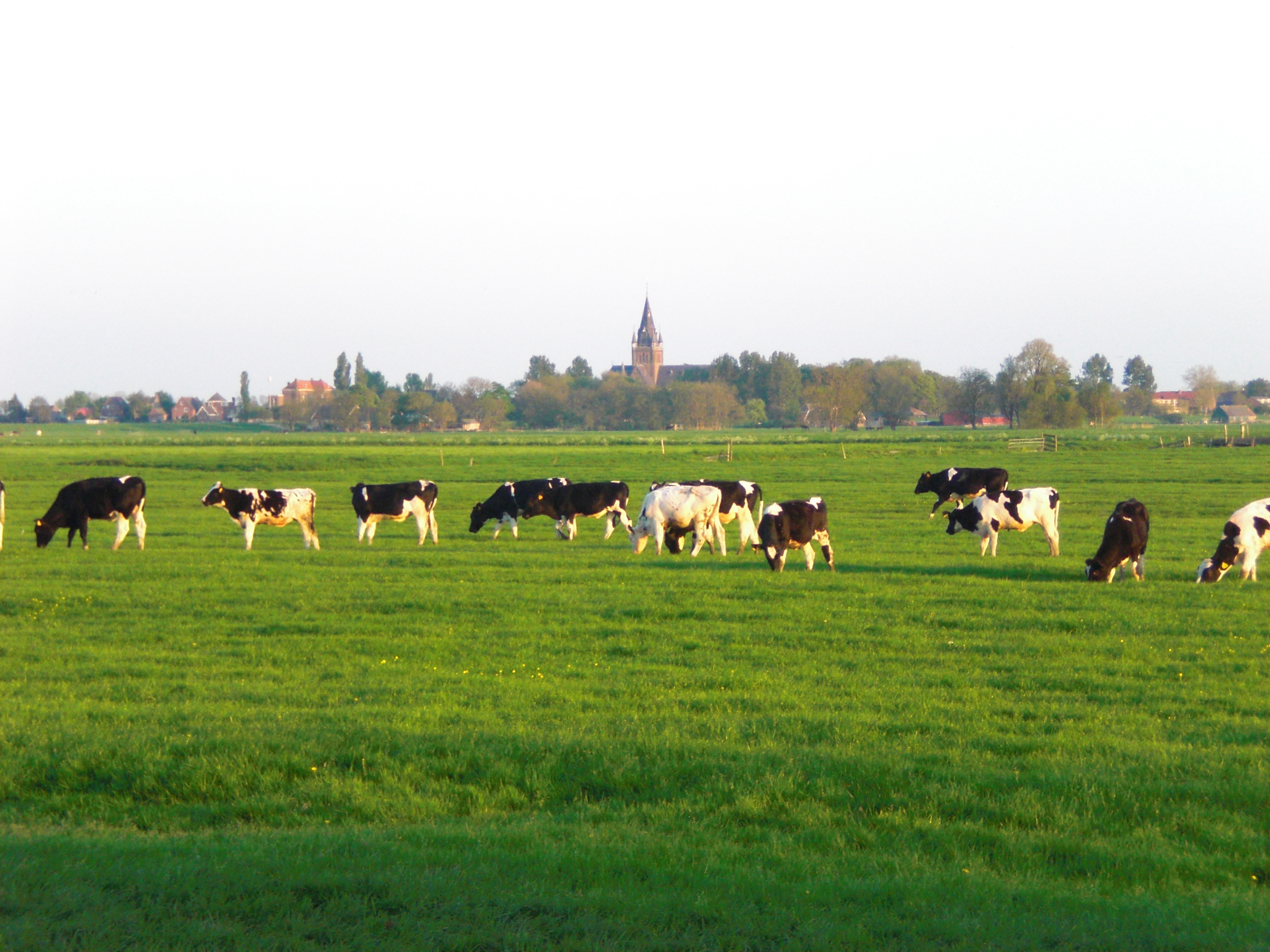 Amstelveen, Netherlands